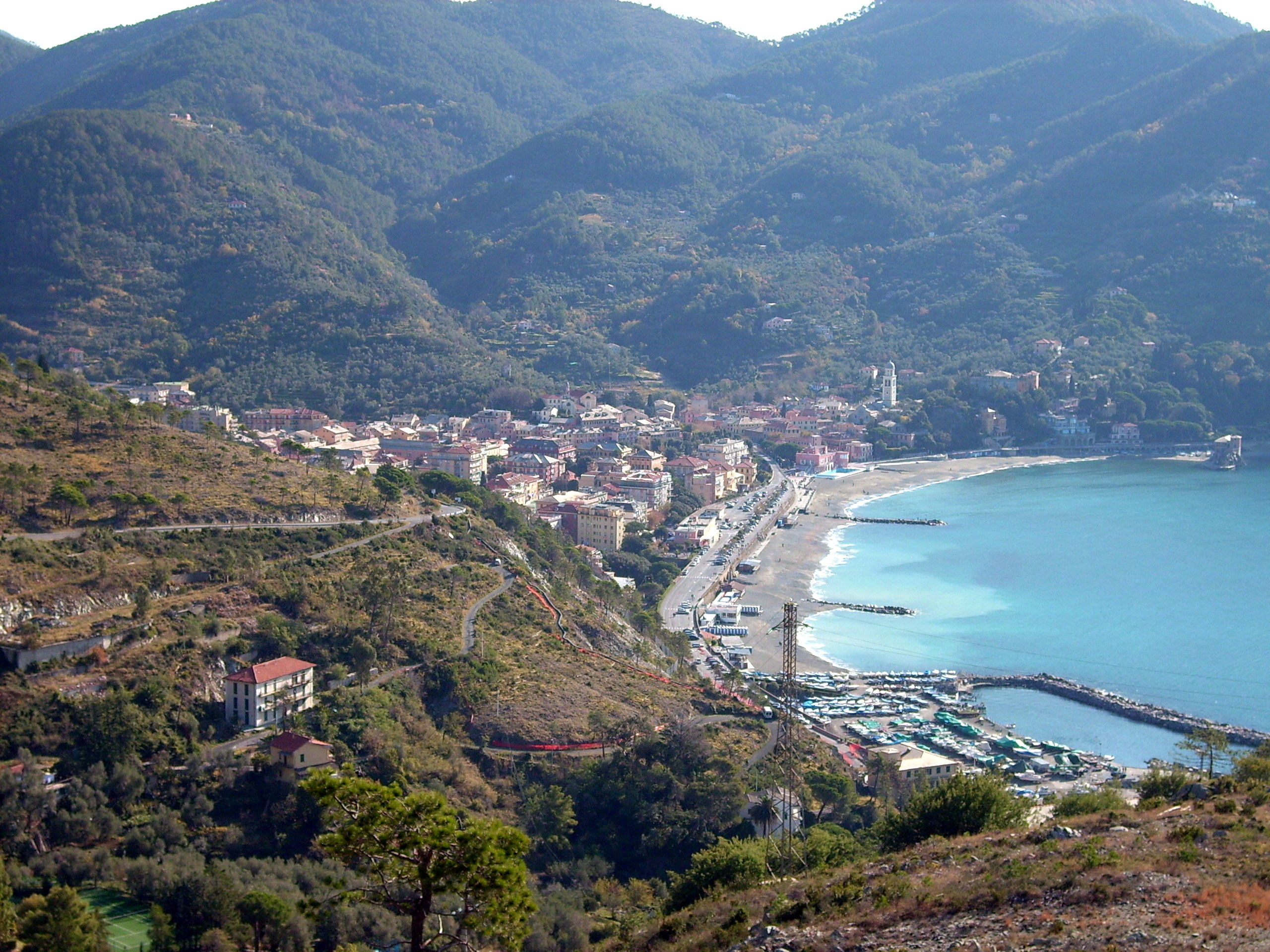 Levanto, Liguria, Italia